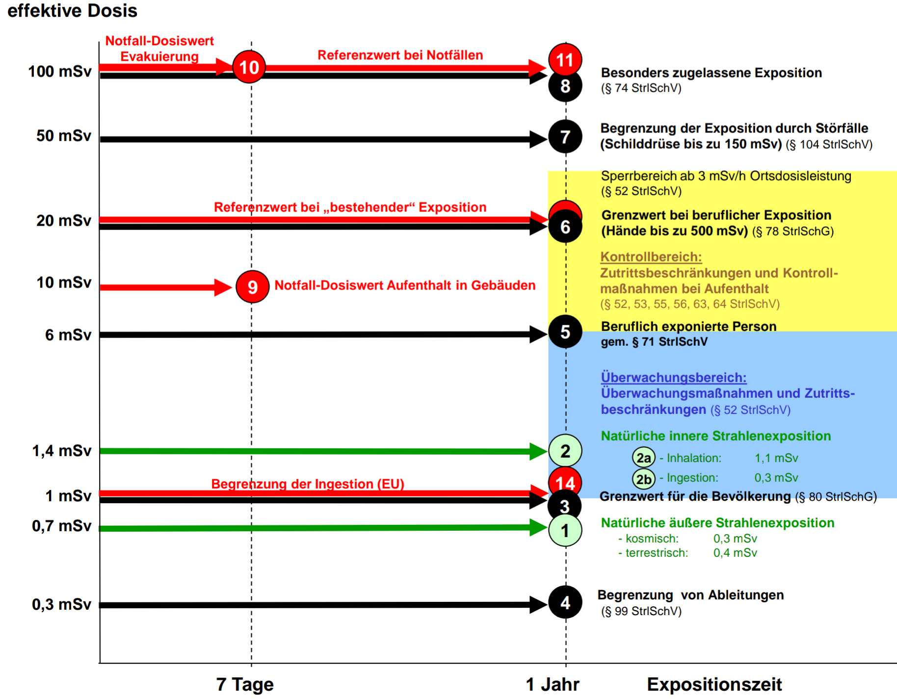 Dosis-Eckwerte (effektive Dosis) zur Bewertung von Strahlenexpositionen